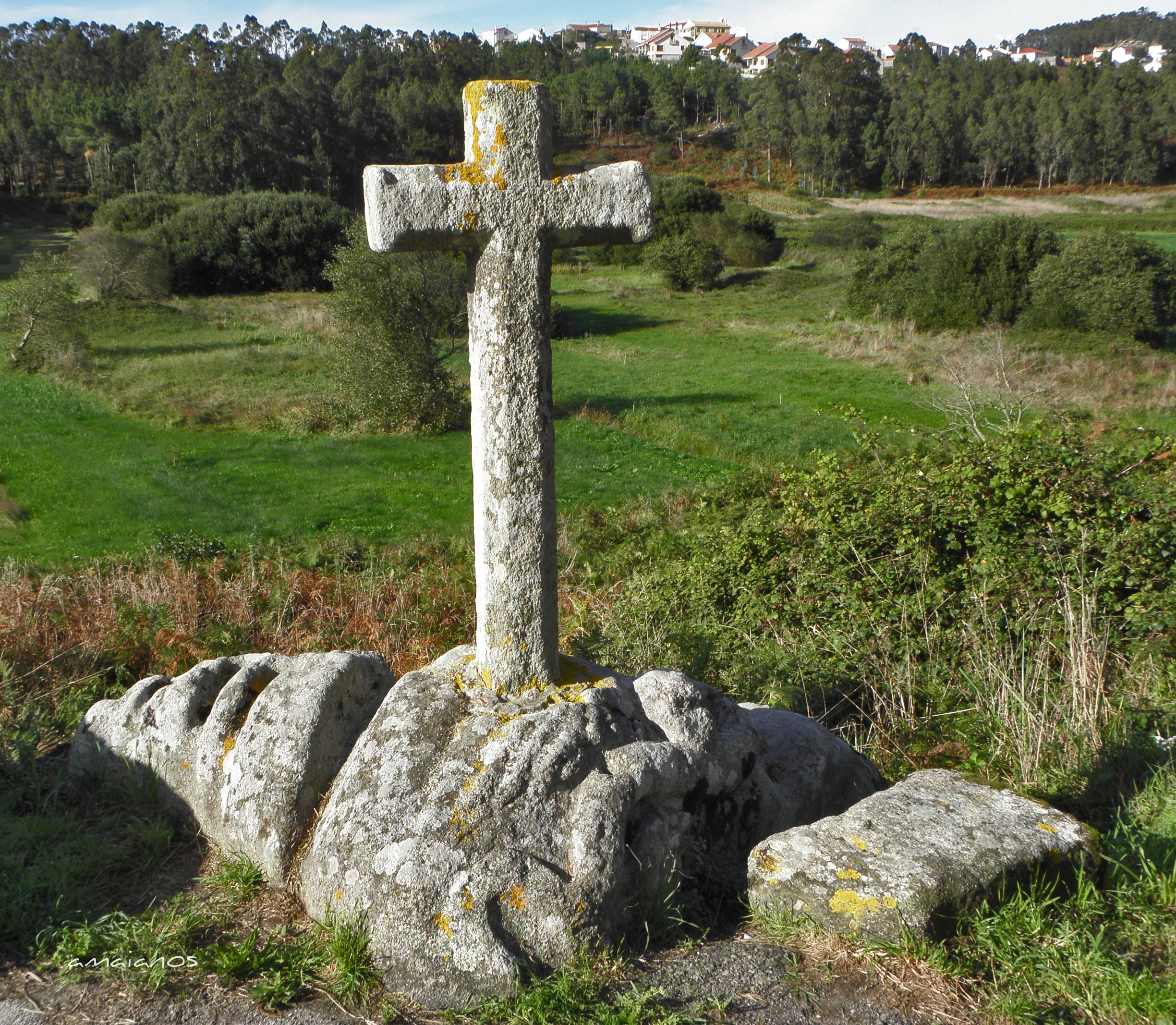 Cruceiro, realizado en granito, que se apoia sobre unha plataforma formada por unha pedra ruda, sen labrar, cunha serpe gravada na súa superficie. A cruz está formada por un fuste de sección cuadrangular, liso, que soporta unha cruz de sección tamén cuadrangular, muxe, cos brazos achaflanados. Existen teorías sobre a súa vinculación cun petroglifo reconvertido en cruceiro en tempos de cristianización. Arredor da serpe, no seu pedestal, pódense observar cazoletas. Conta a lenda que foi Santo Adrián, patrón desta parroquia, o que librou esta terra dunha praga de serpes, ao petar fortemente co pé no chan e facelas desaparecer todas, quedando encantadas baixo esta pedra.